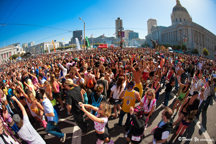 San Francisco LovEvolution 2009